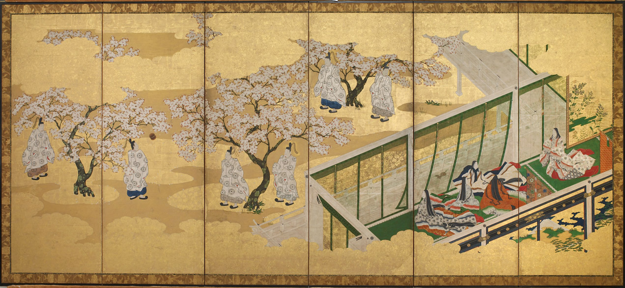 Kashiwagi (chapitre 34), Genji monogatari. Encre, couleur et or sur papier. H: 154.6 L: 359.7 cm